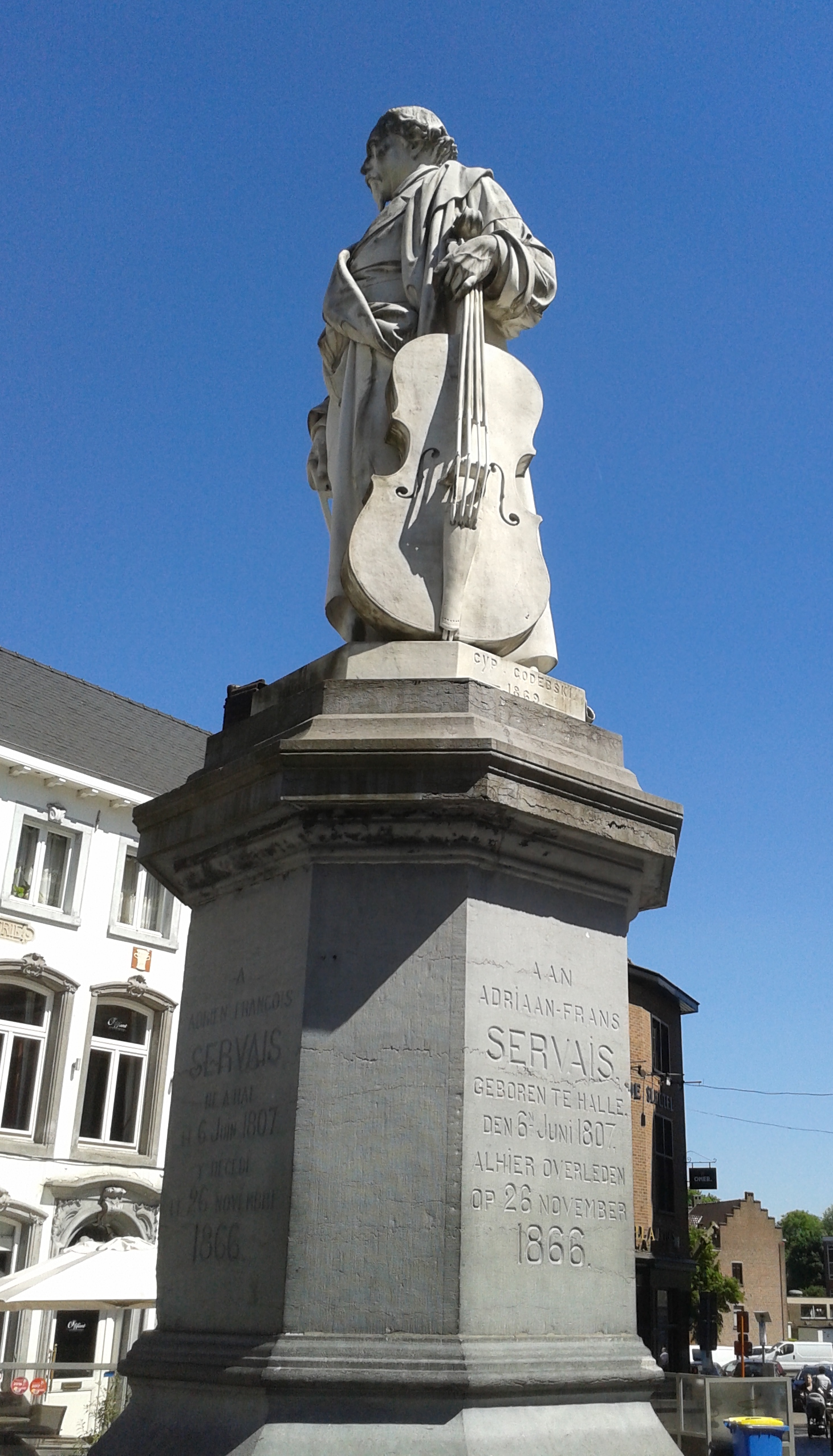 Cyprian Godebski – pomnik Servaisa w Halle.